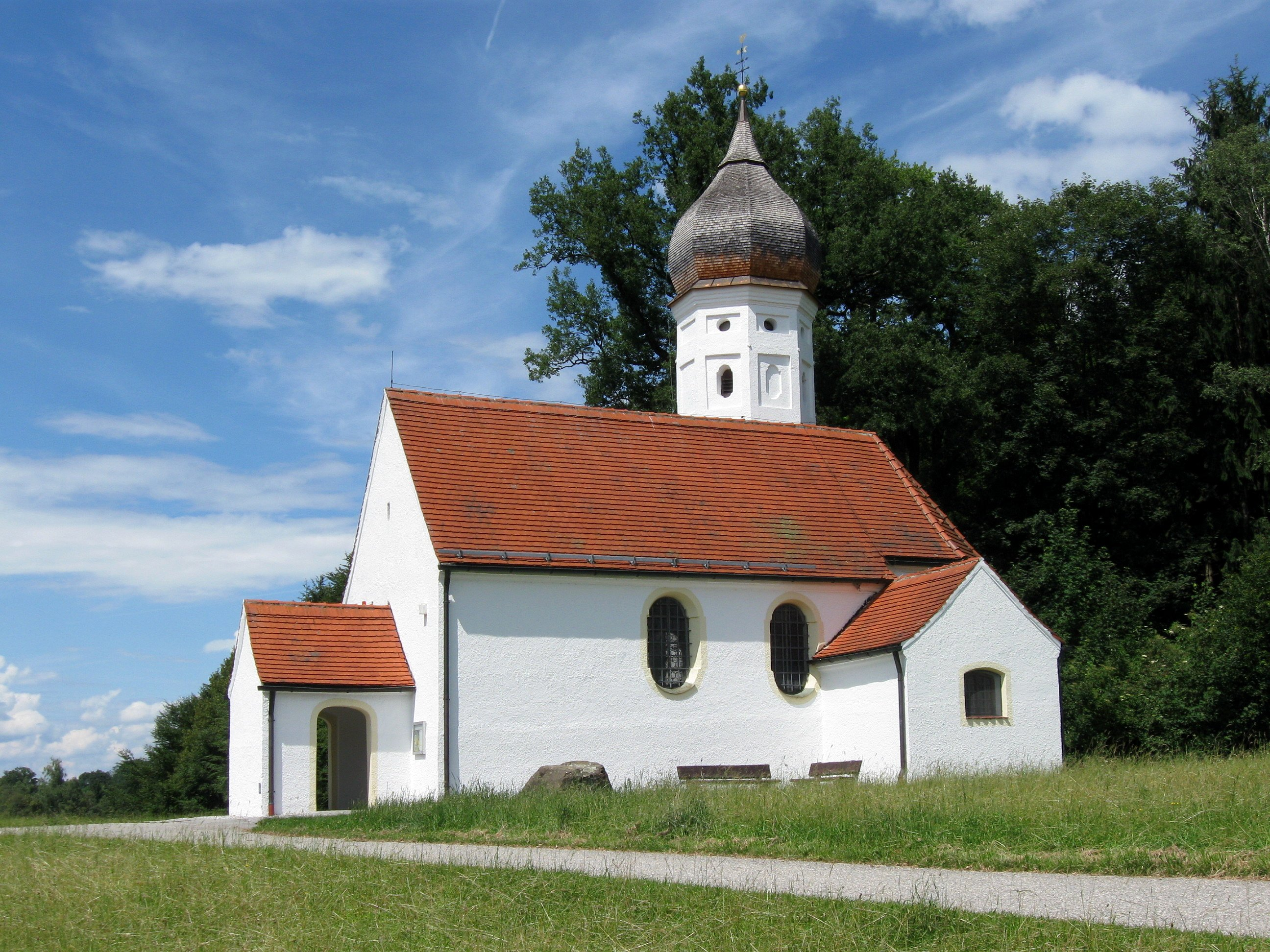 Maria Heimsuchung; Hub; erbaut 1630, umgestaltet 1696; mit Ausstattung